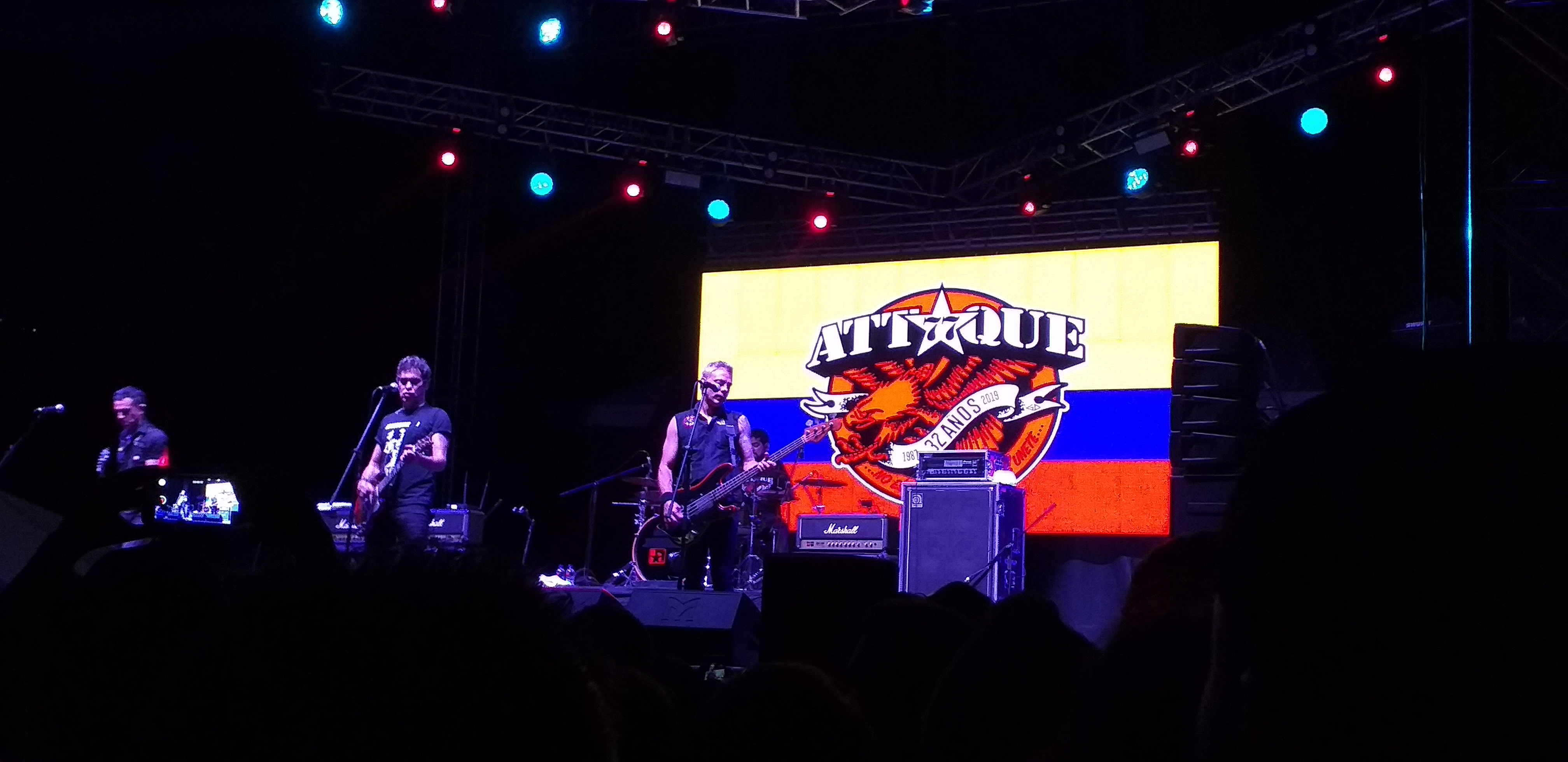 Attaque 77 durante una presentación en la ciudad de Medellín.